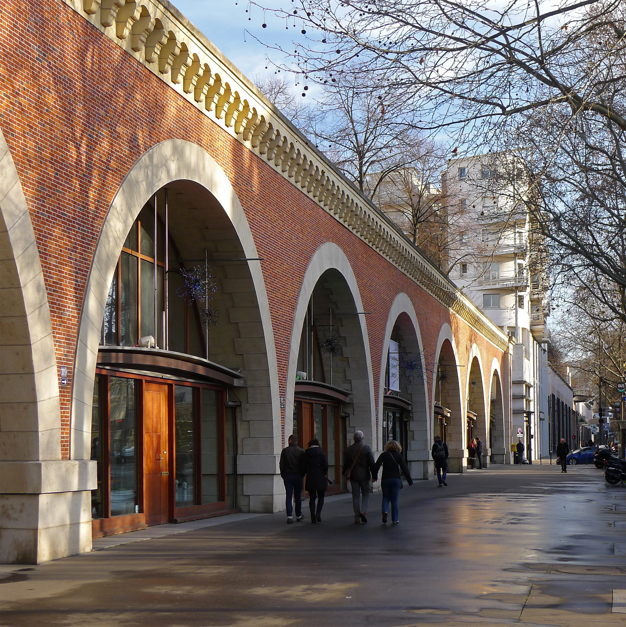 Viaduc des arts sur l'avenue Daumesnil - Paris XII